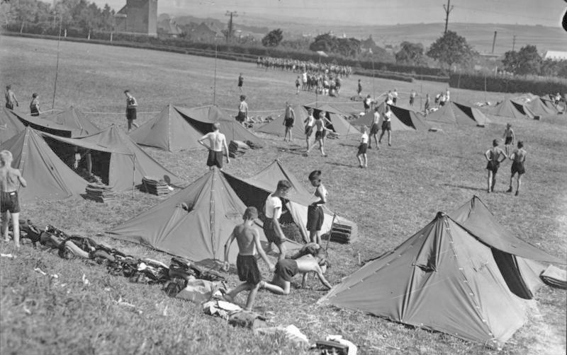 Hitlerjugend, Zeltlager Hitlerjugend, Deutsches Jungvolk (Pimpfe).- Auf dem Zeltplatz.